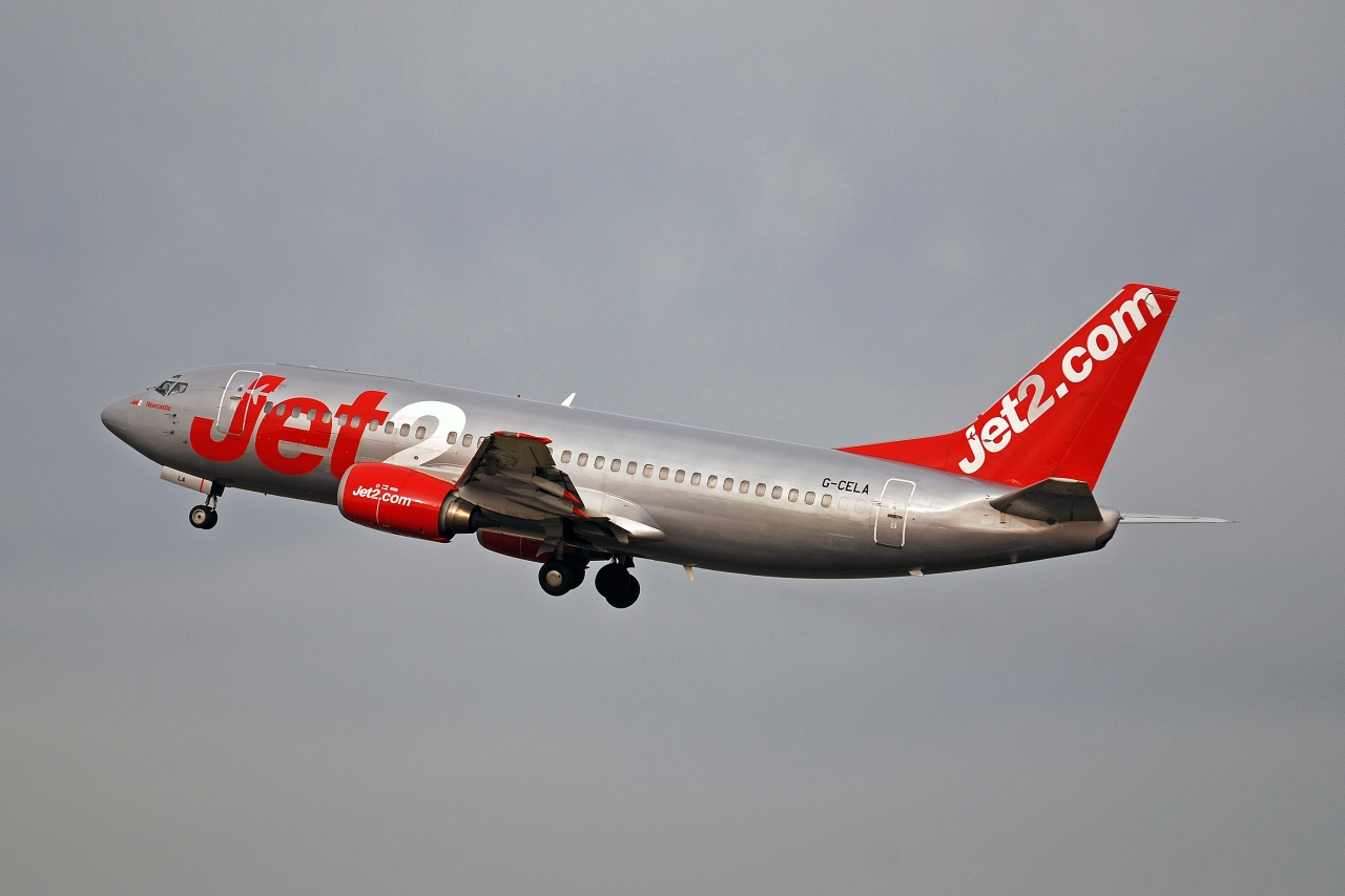 Boeing 737-377 Amsterdam schiphol EHAM (17-02-2007)